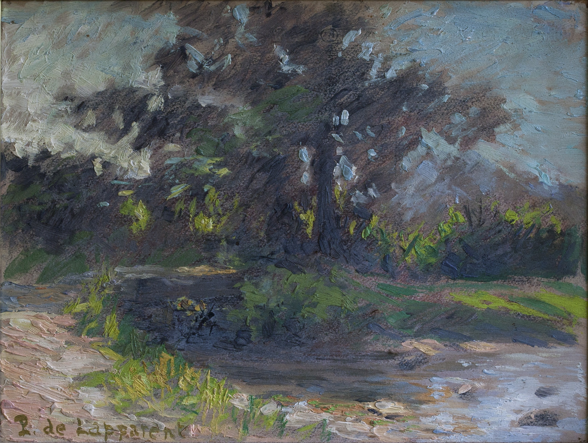 tableau